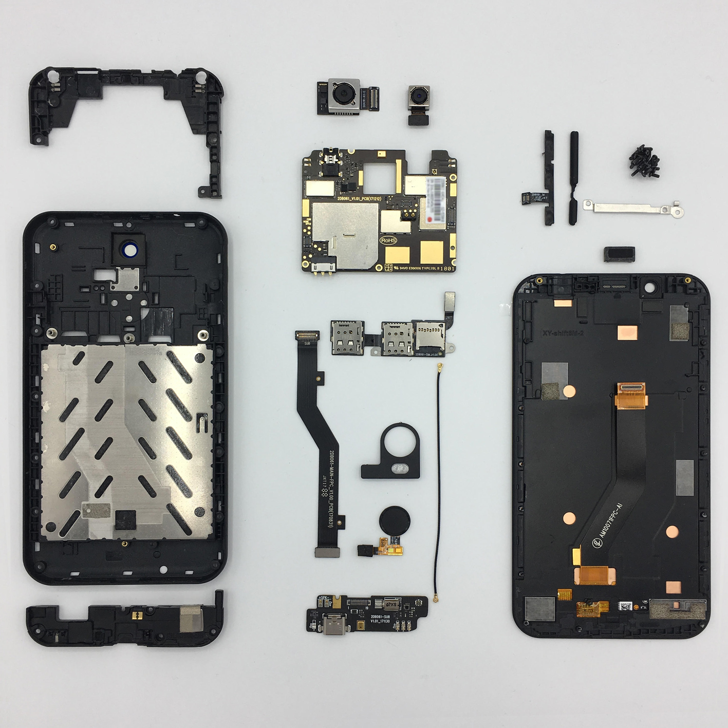 Deitsch: Modularer Aufbau des Shift6m